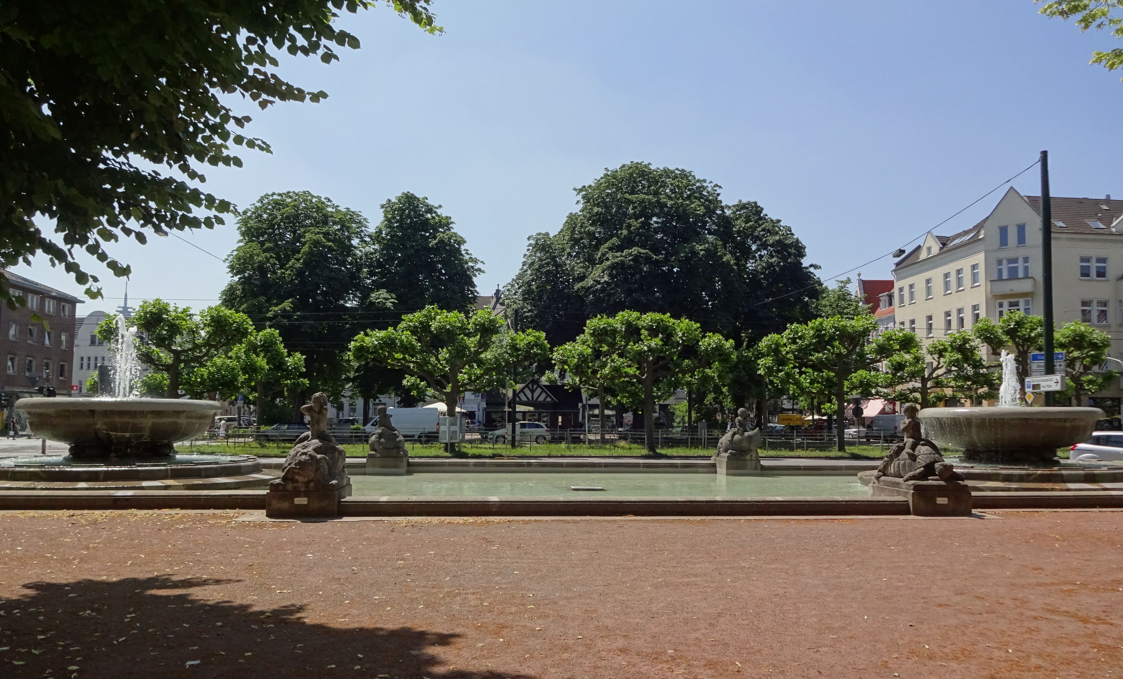 Brunnen am Barbarossaplatz, Juni 2018